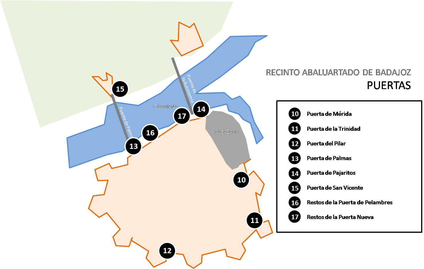 Recinto Abaluartado BADAJOZ- PUERTAS- sin calles (2)